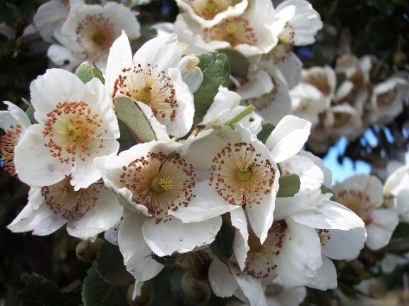 Flores de ulmo o muermo {Eucryphia cordifolia Mapudungun: Ngulngu ñi peskiñ